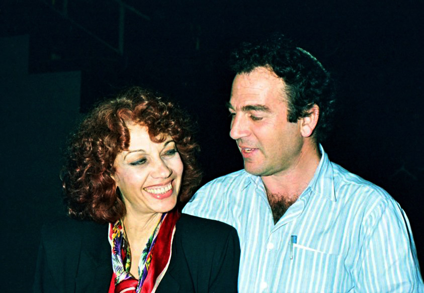 נורית גפן והמפיק דני פארן בעת עבודתה כמפיקה